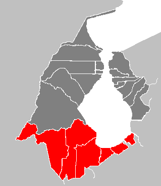 Ubicación de la subregión del Sur del Lago de Maracaibo en el Estado Zulia